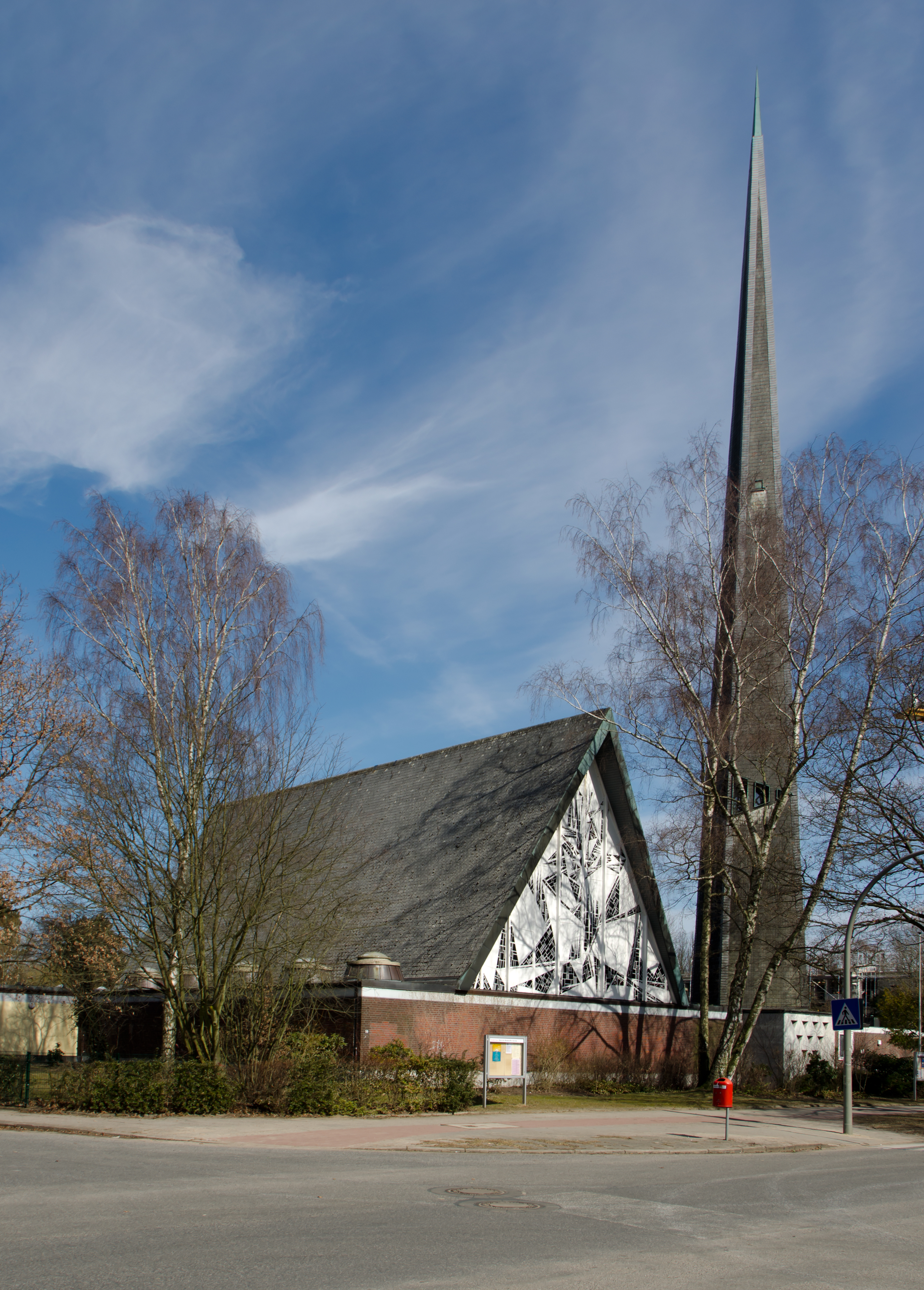 HH-Oldenfelde Bonhoeffer-Kirche von Südwest